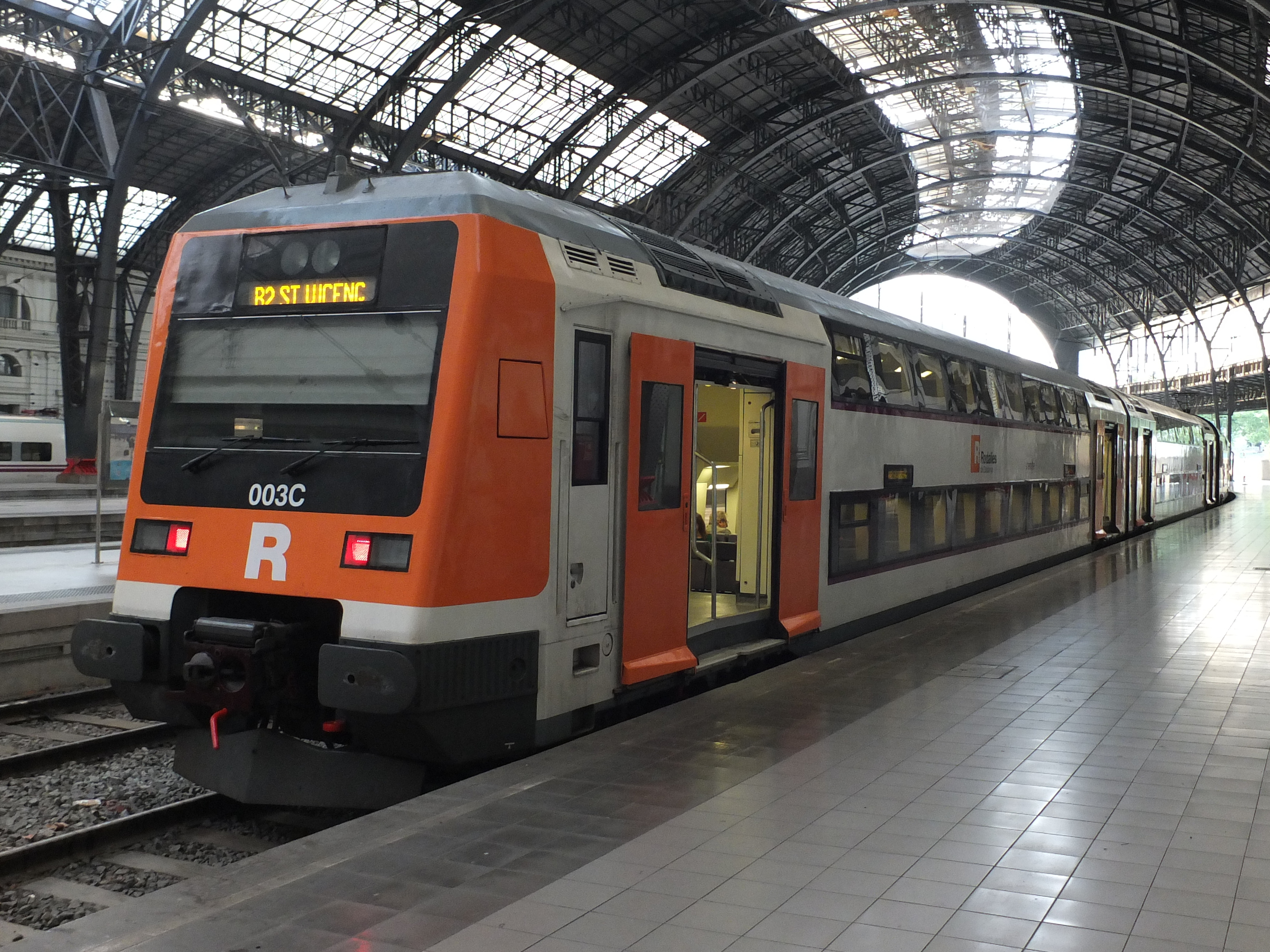 RENFE serie 450-451, Rodalies 003 C, in het Estacio de Francia in Barcelona.